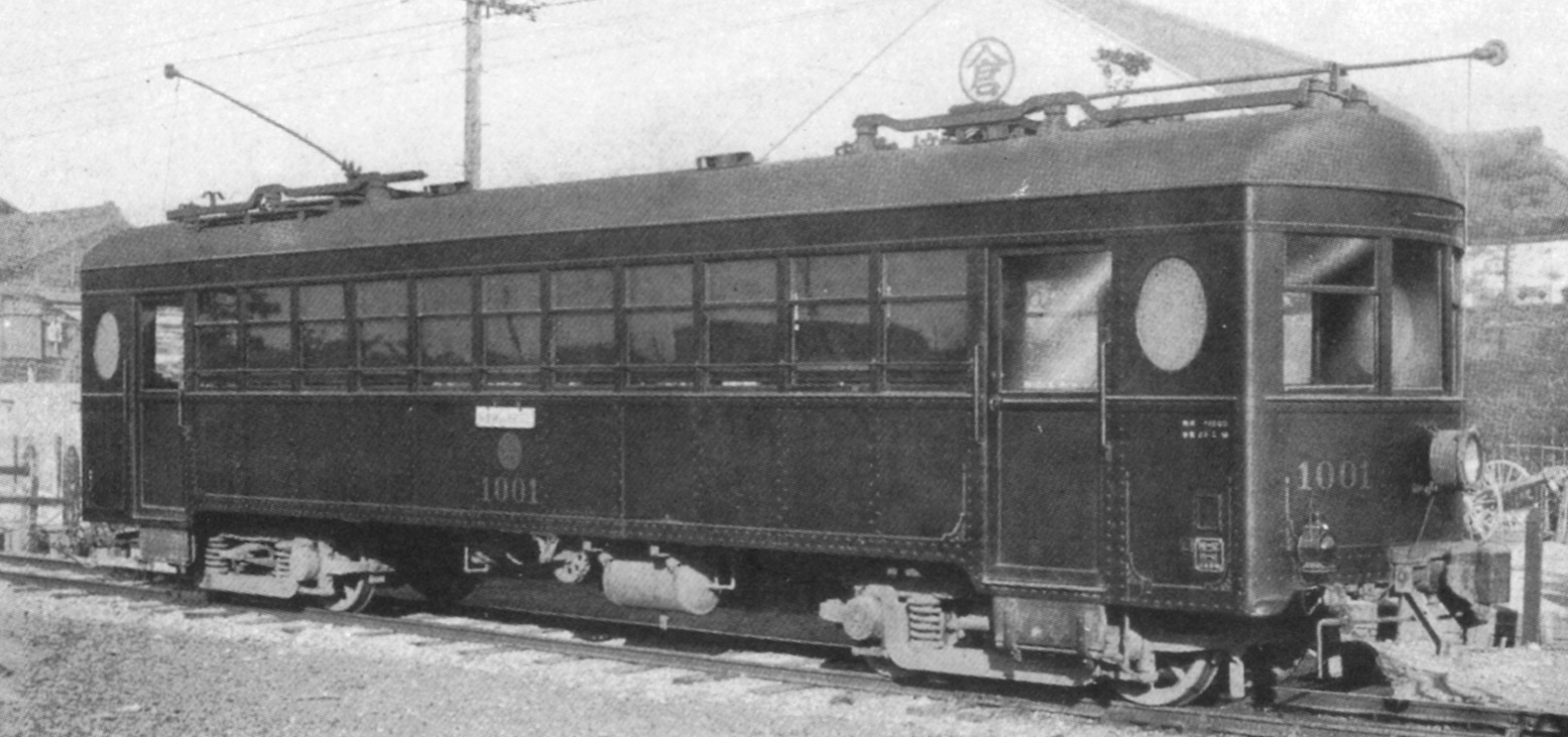 渥美電鉄デテハ1001（撮影時期の特定は『名古屋鉄道車両史 上巻』より）